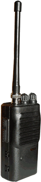 Портативная радиостанция диапазона 27 МГц Hunter-6